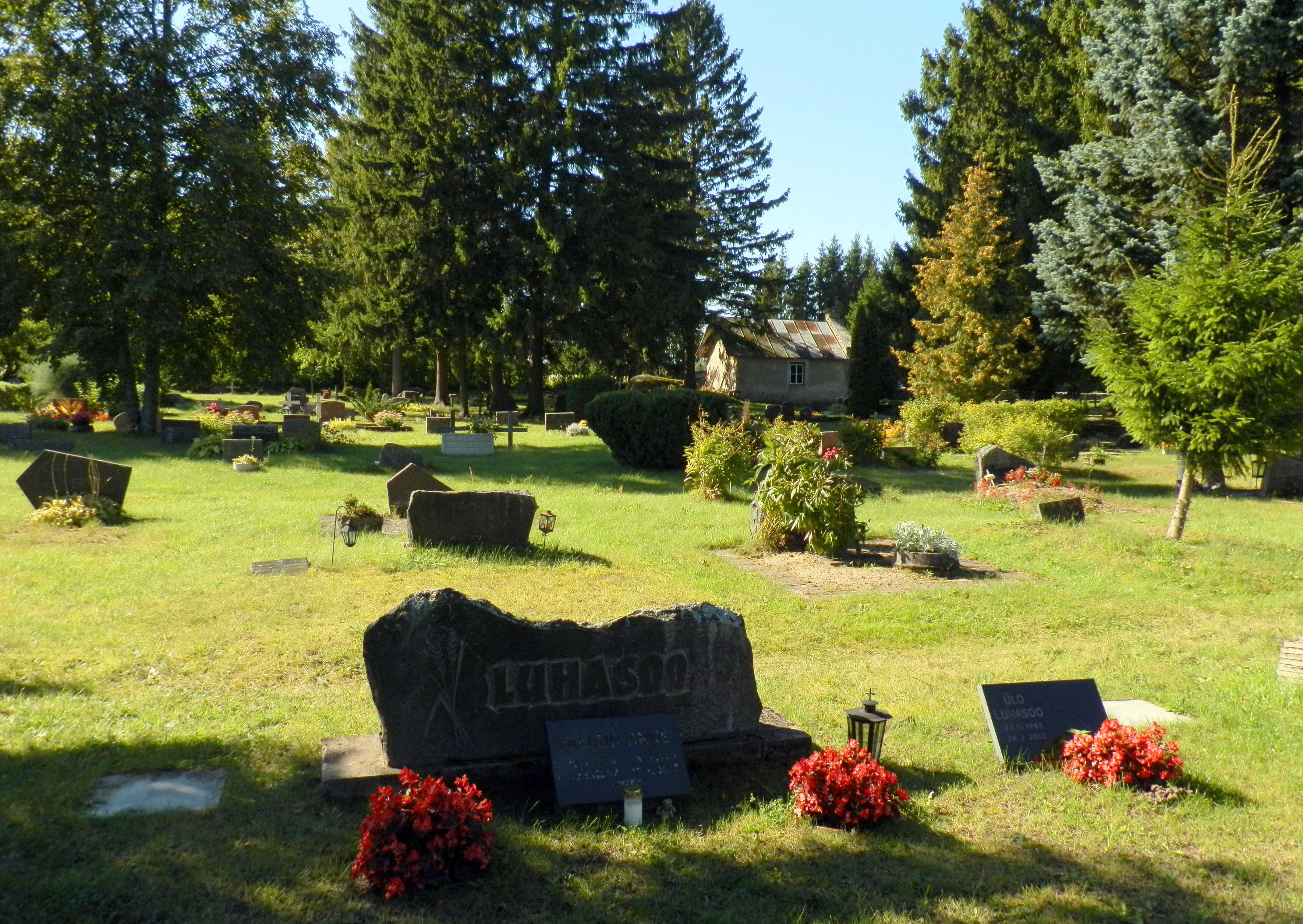 Ridala uus kalmistu. Lääne maakond, Ridala vald, Kolila küla